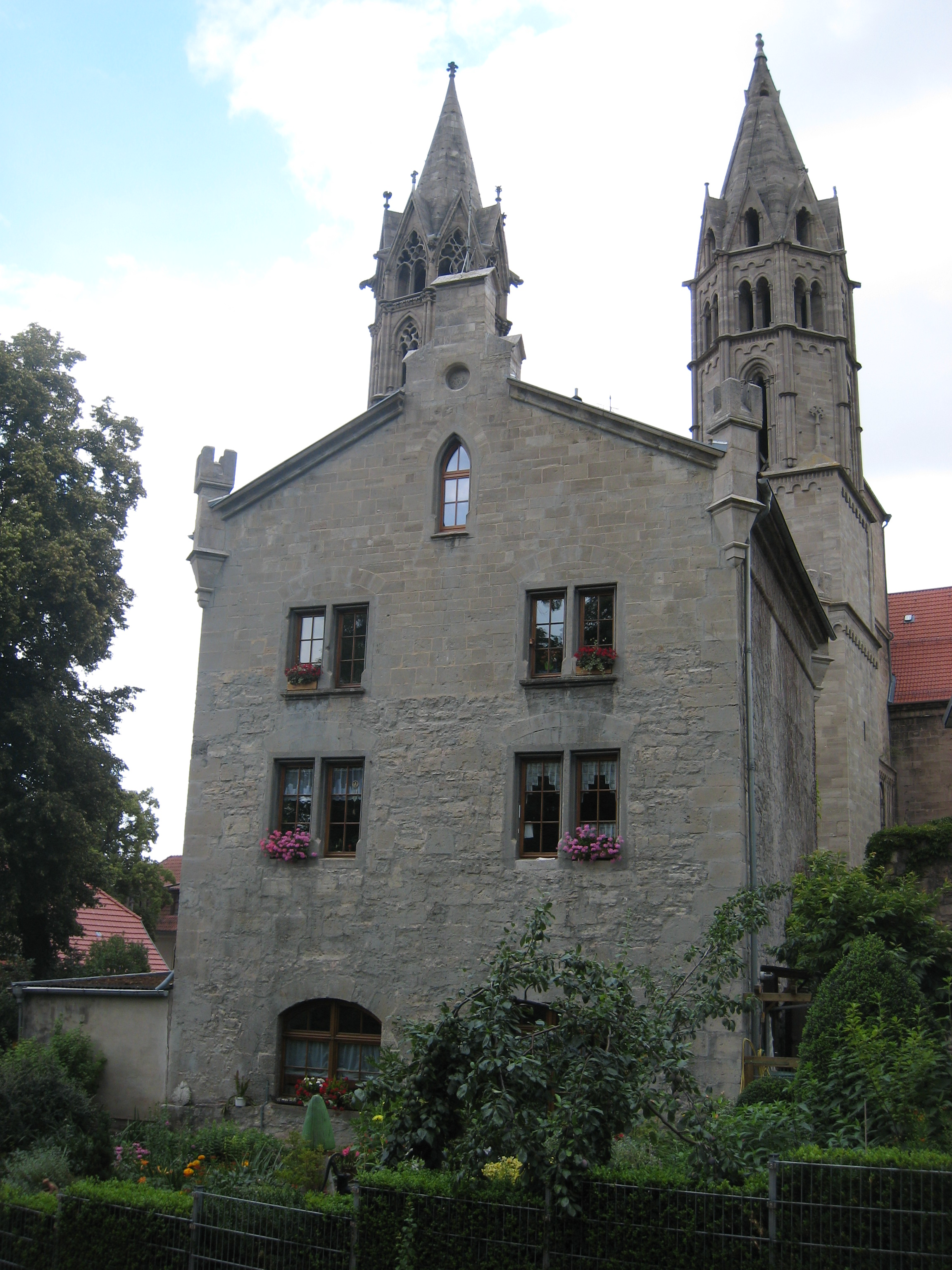 Brunnenkunst in Arnstadt, im Hintergrund die Türme der Liebfrauenkirche.